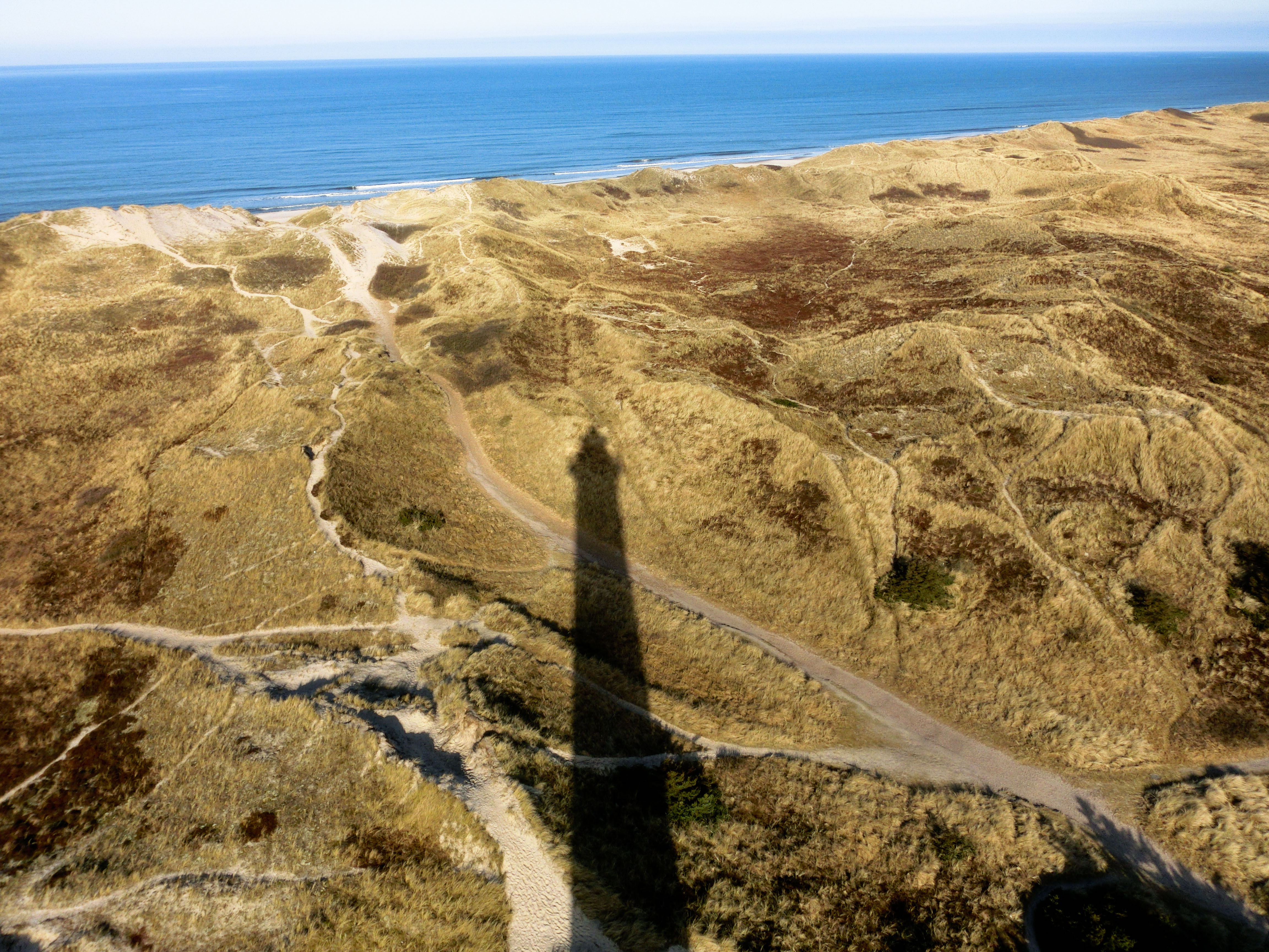 Blick vom Leuchtturm Lyngvig Fyr